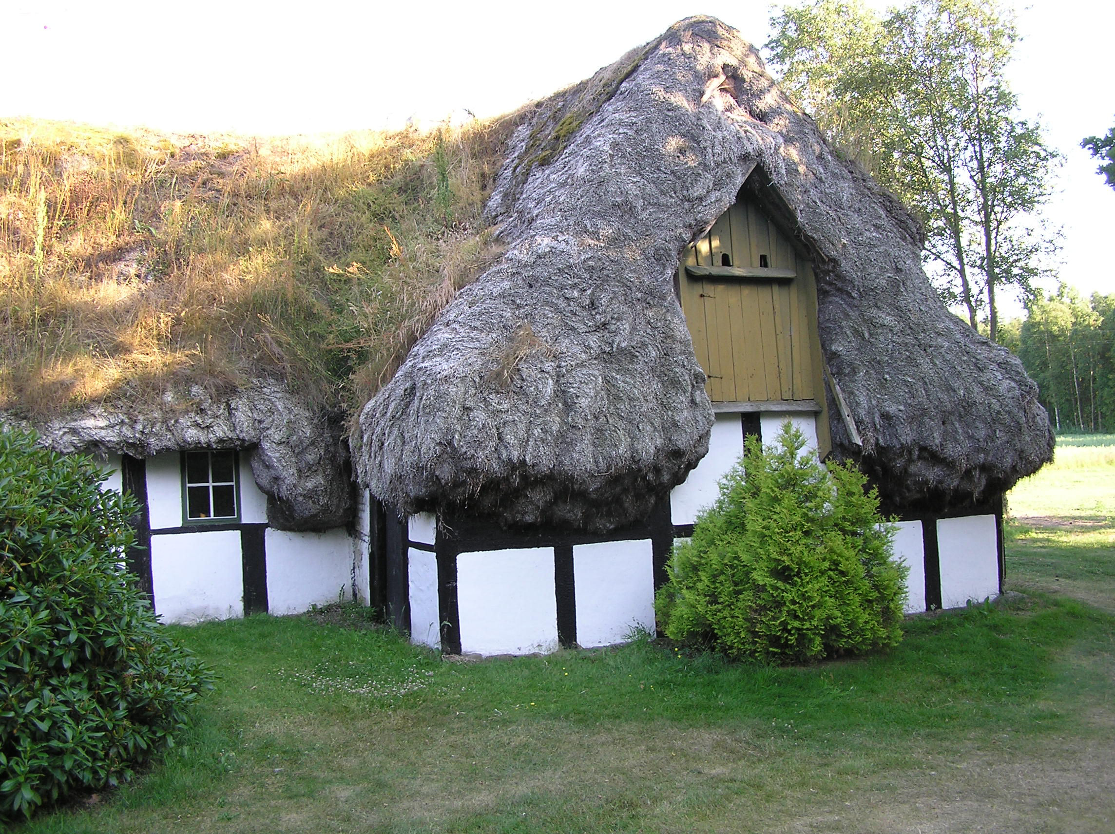 Hedvigs Hus, Læsø,traditionelt tag af ålegræs, roof made of eelgrass